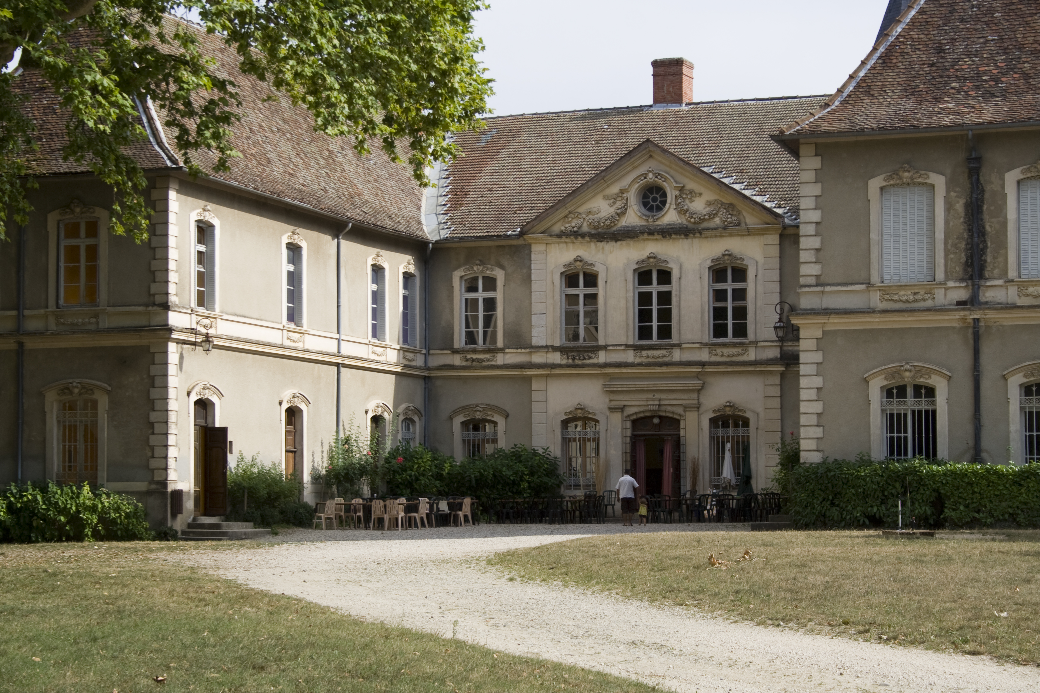 Le château de Passins (38510)